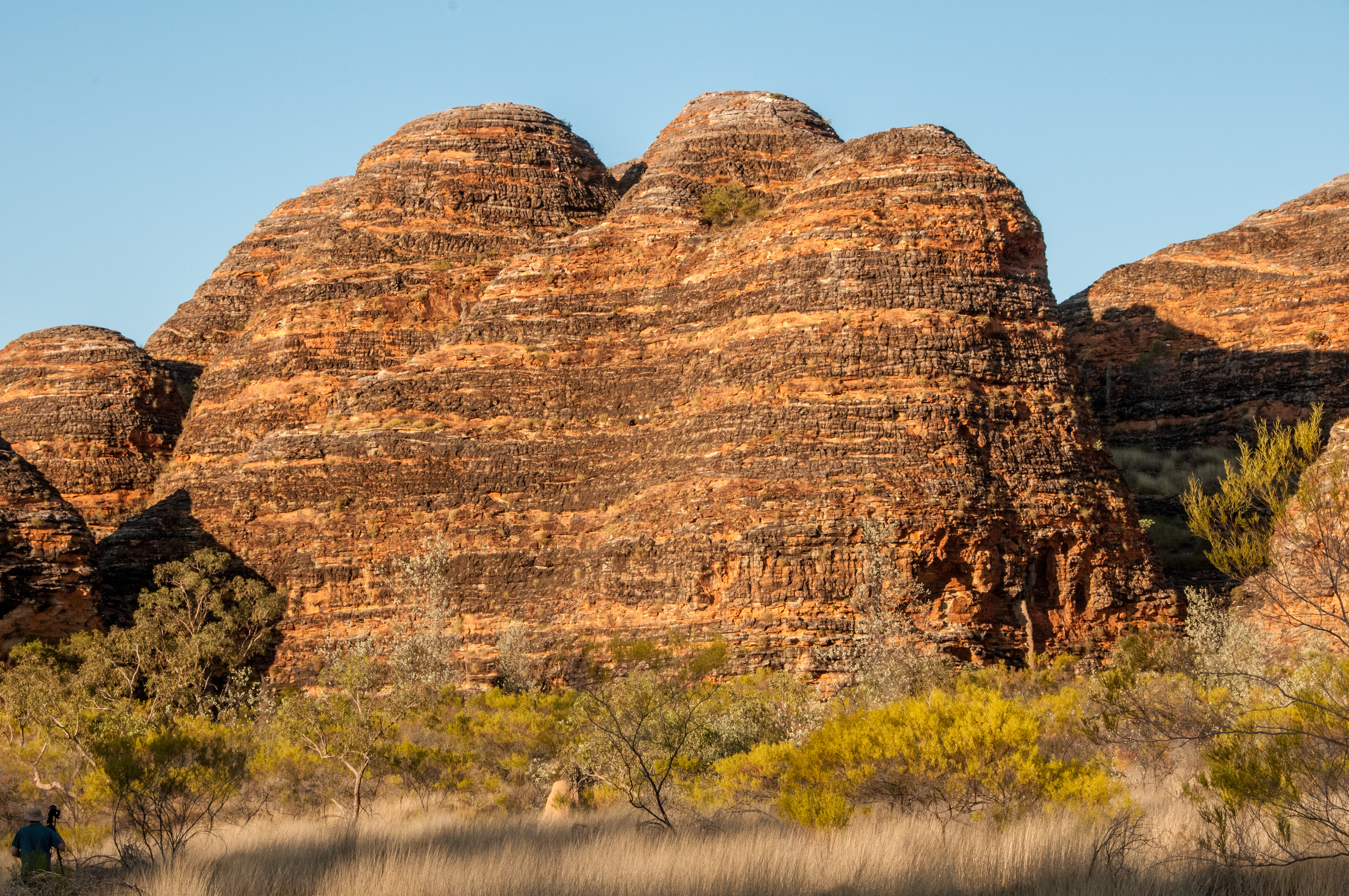 In the Bungle Bungles